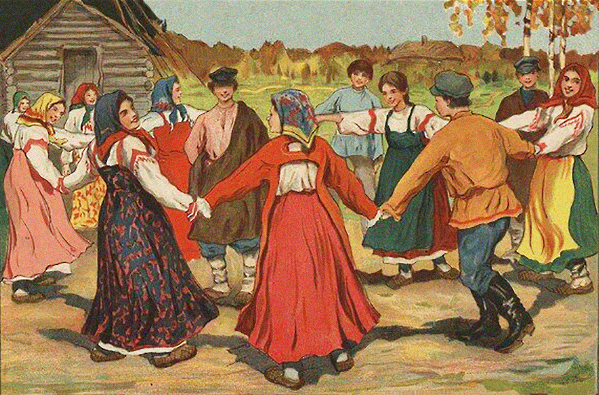 1900-е Песни А.В. Кольцова. — Москва Литография Т-ва И.Д. Сытина